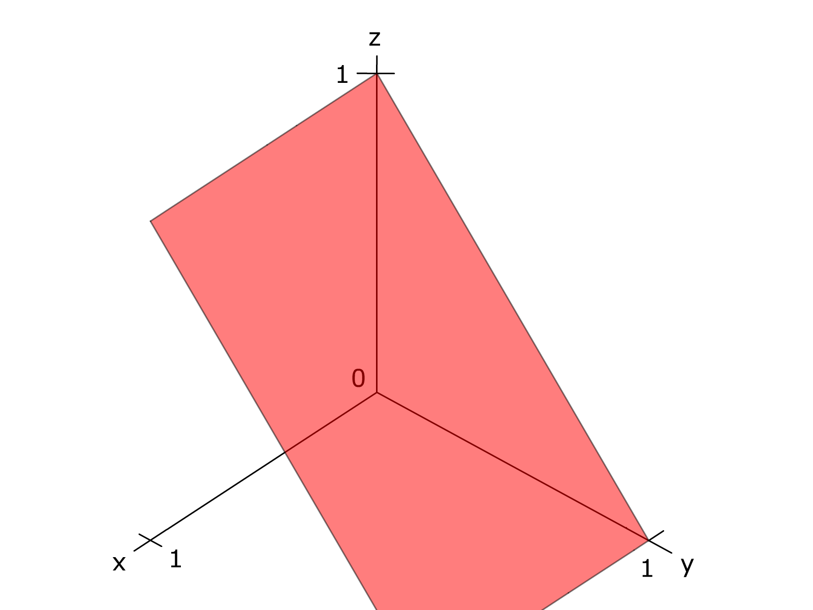 Kristall Ebene - Miller Indices